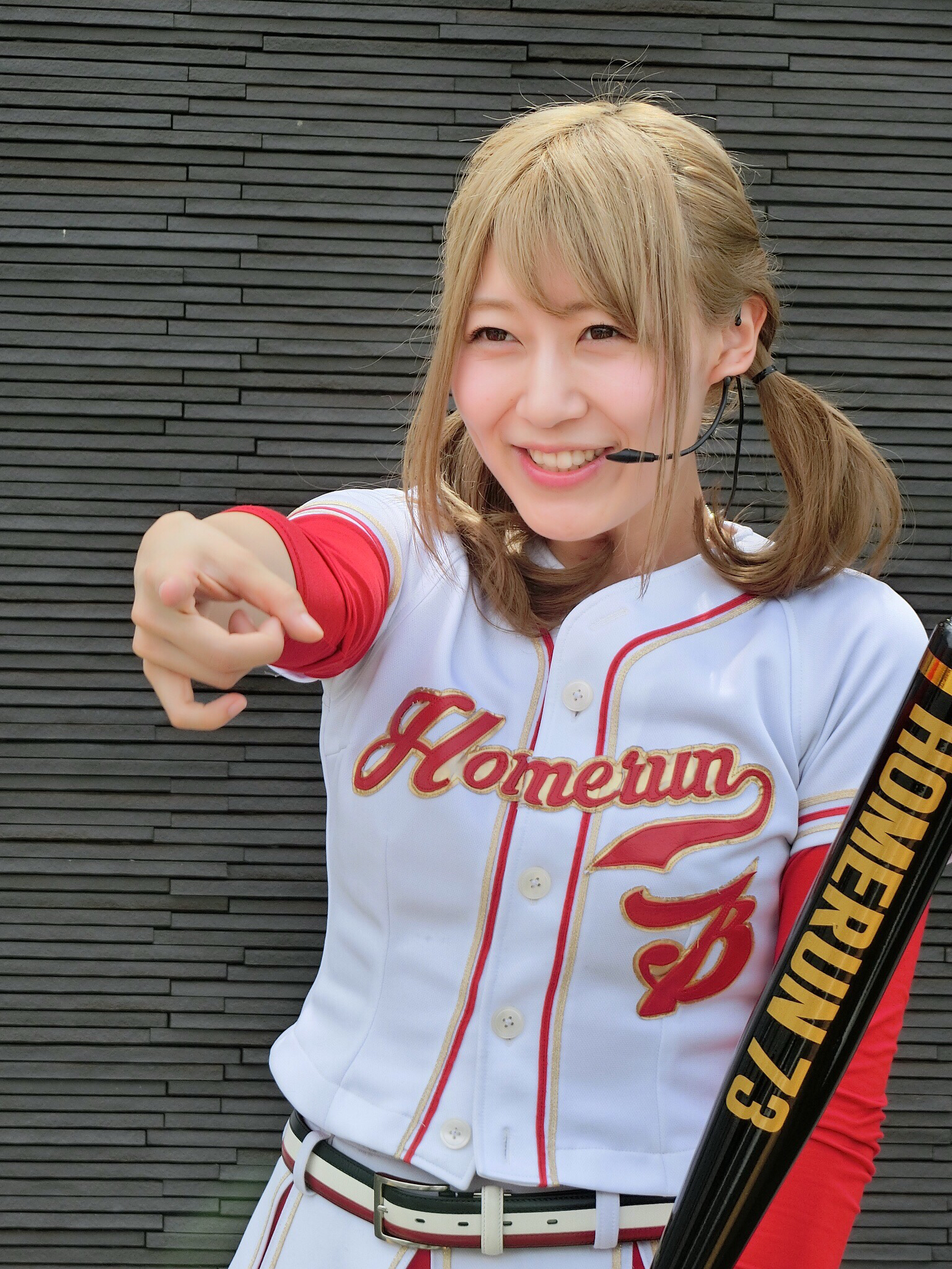 ホームランなみち、愛知県にて2019年2月19日撮影。